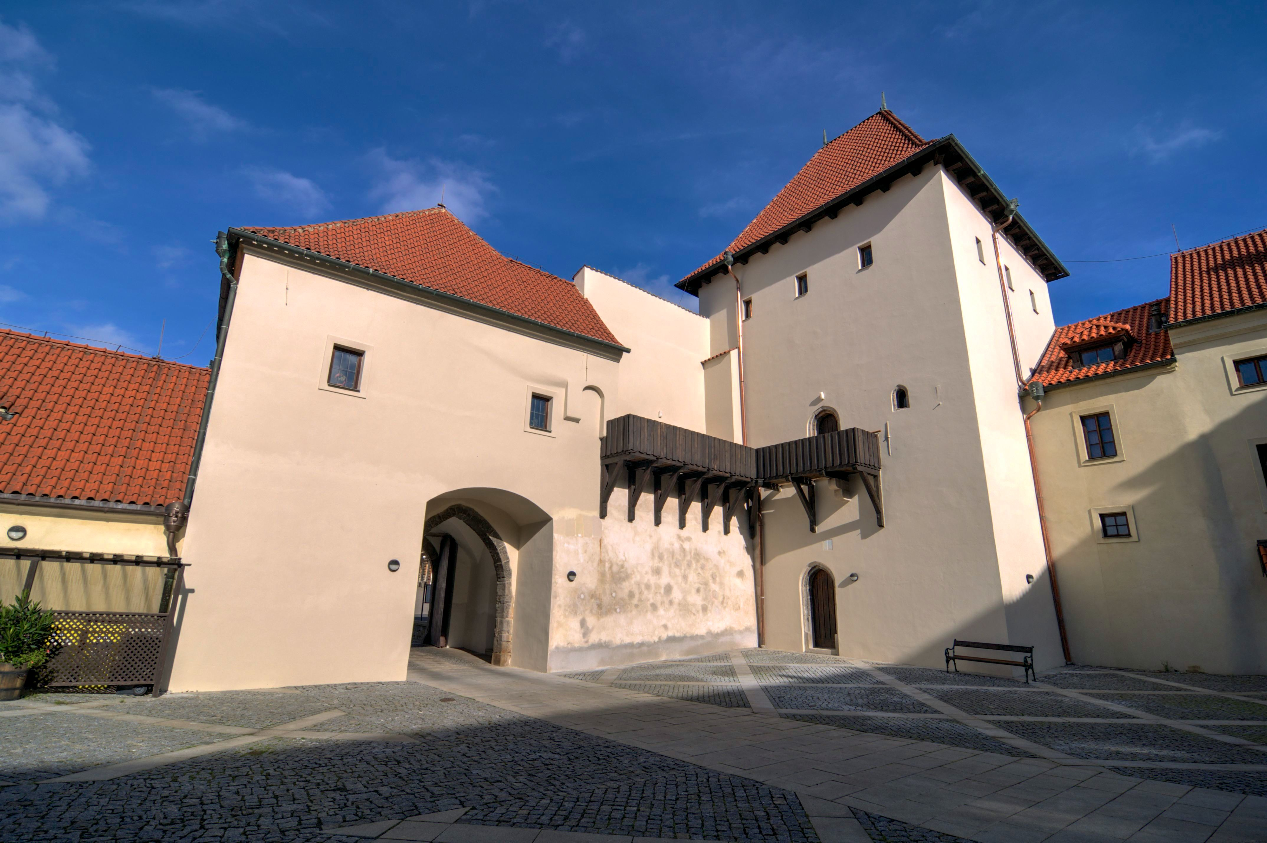 Hrad Kadaň, Tyršova 567, Kadaň.